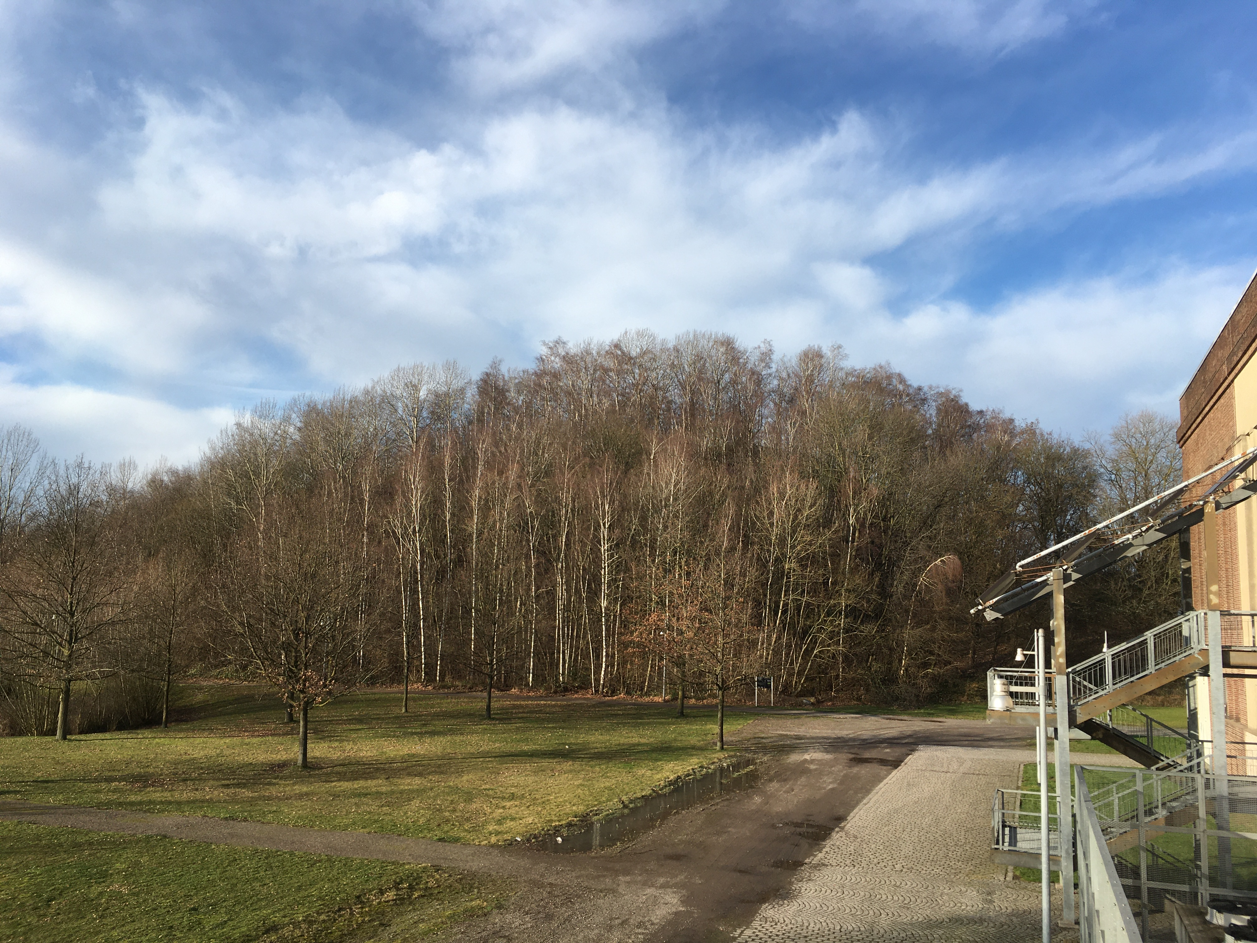 Halde Sachsen, von der ehemaligen Maschinenhalle aus gesehen